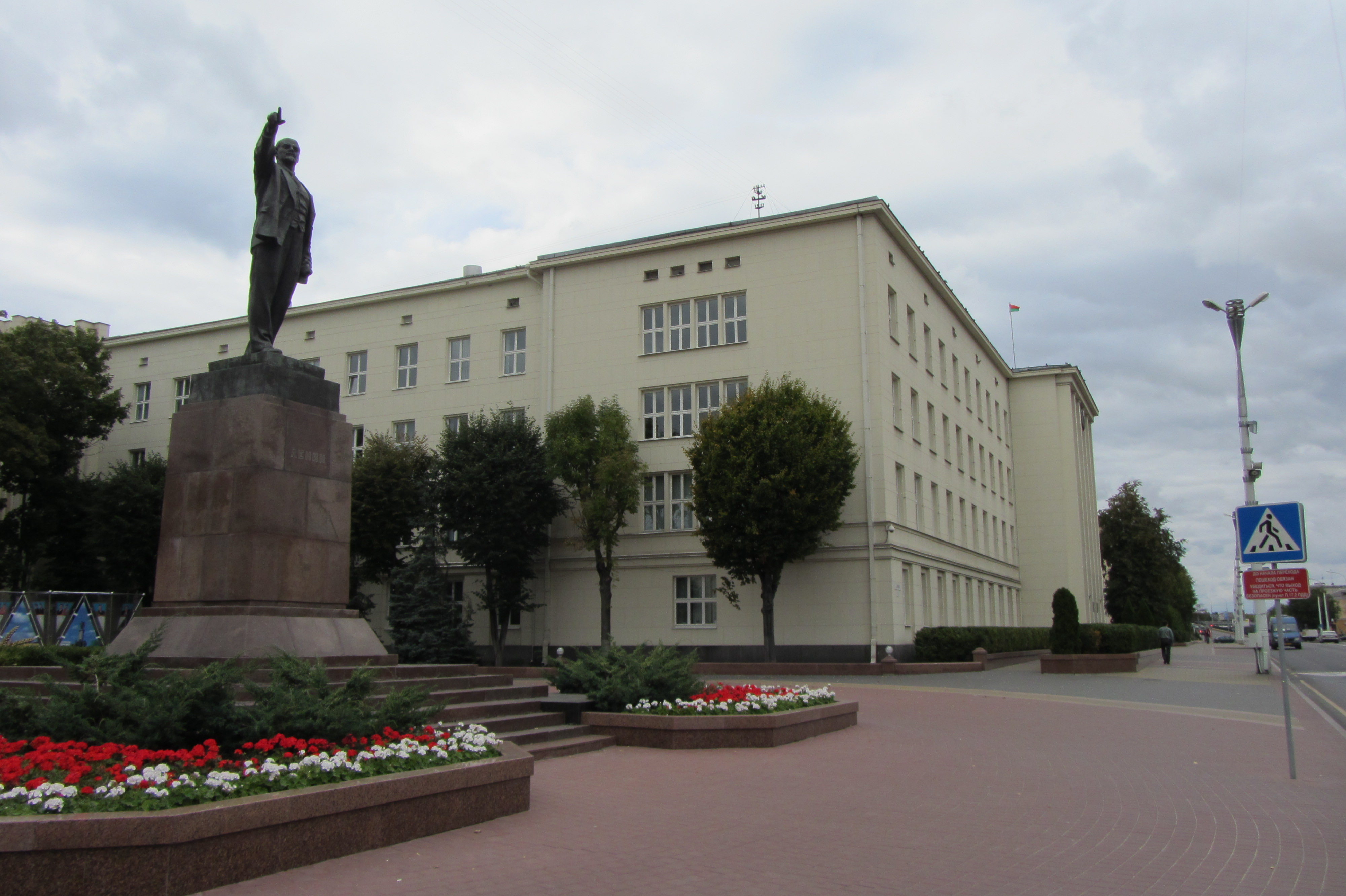 Беларуская (тарашкевіца): Забудова пл. Леніна. г. Берасьце This is a photo of Belarusian heritage monument. Reference number: 113Г000013 ( WLM)